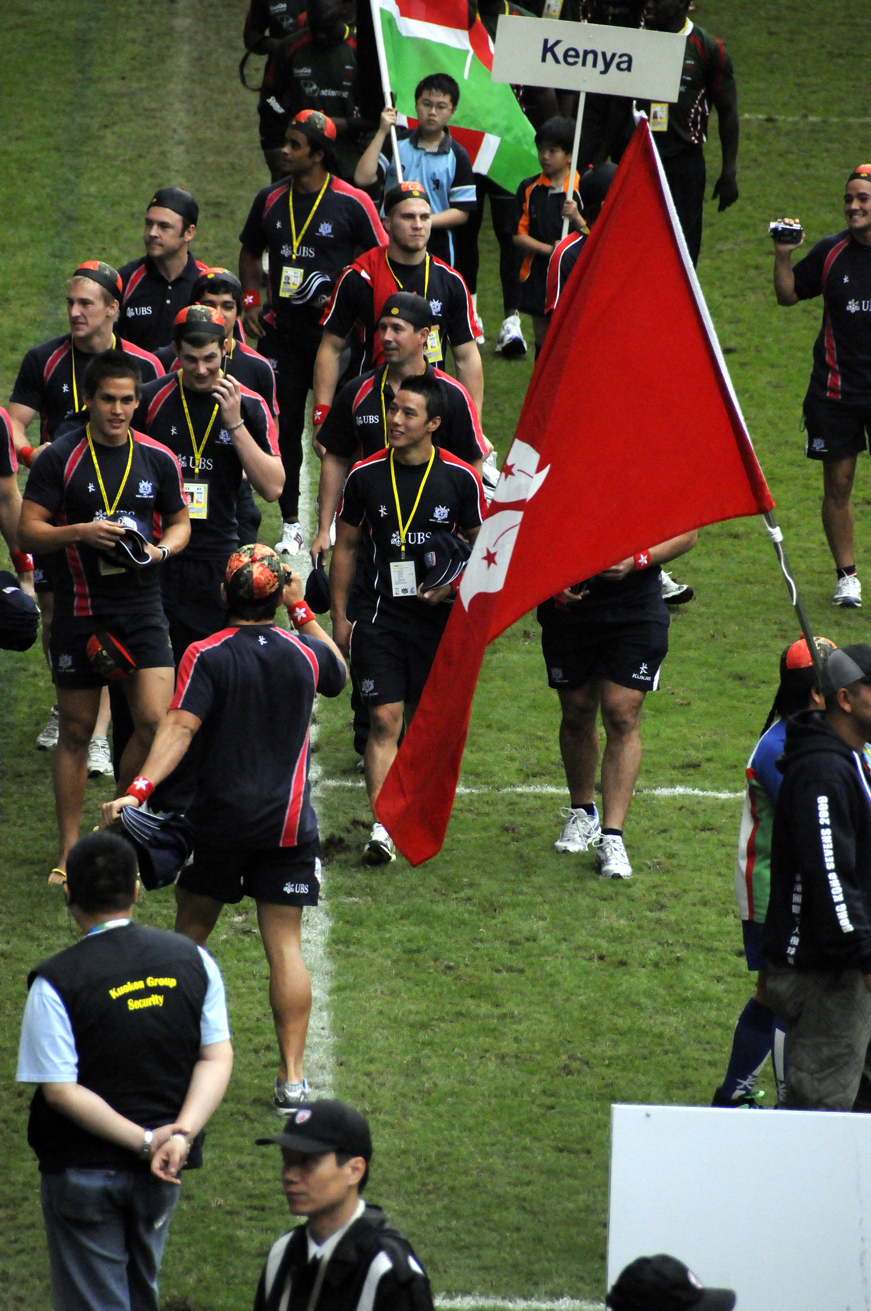 Hong Kong Sevens Rugby Team.jpg